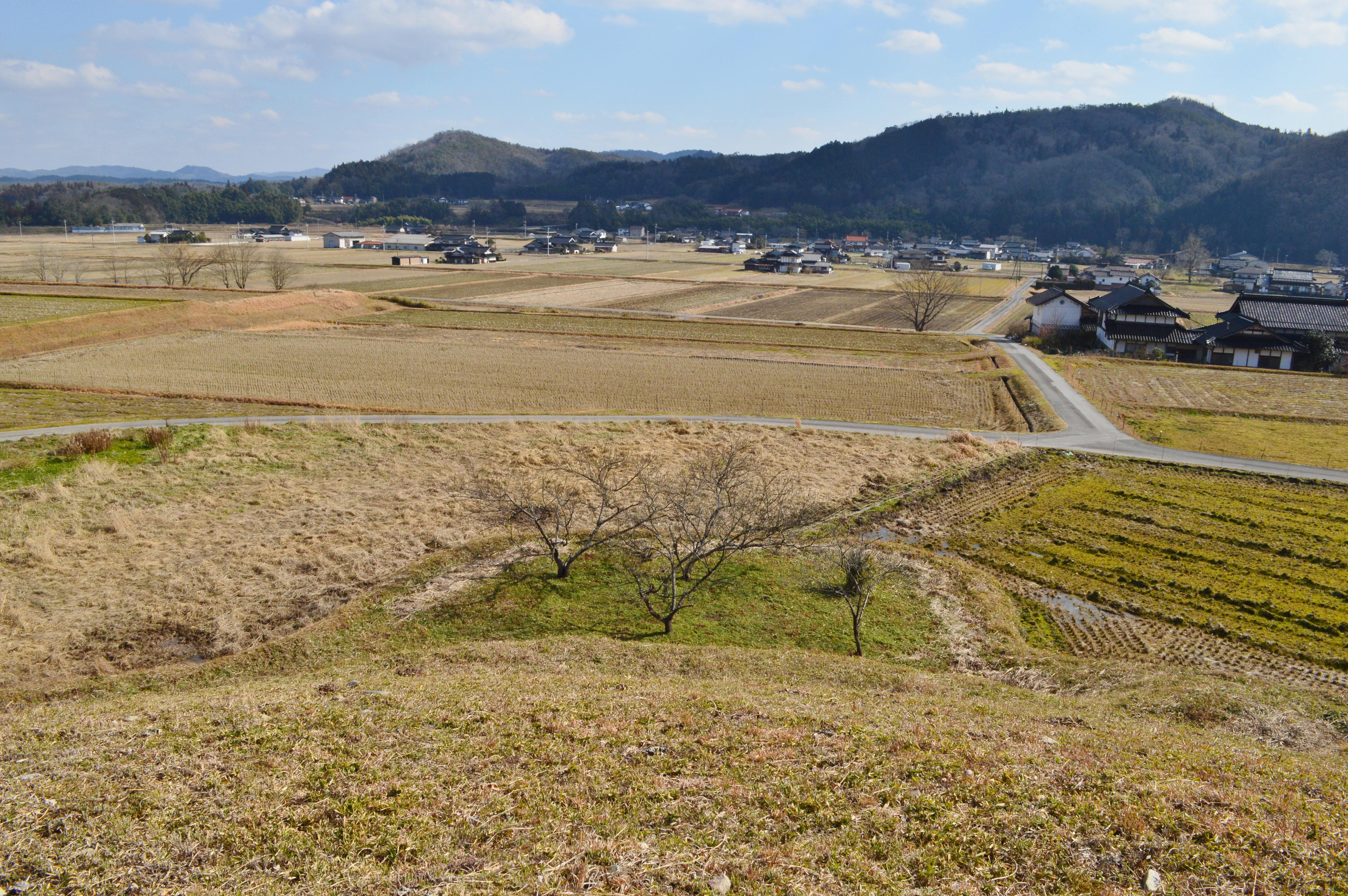 糸井大塚古墳 後円部から前方部を望む Nikon D3200